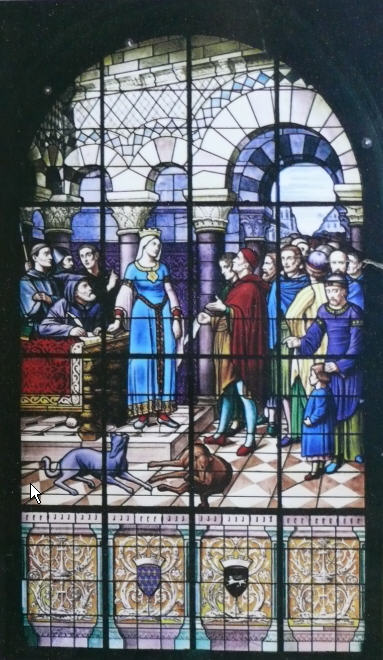 Elonora Akvitánská